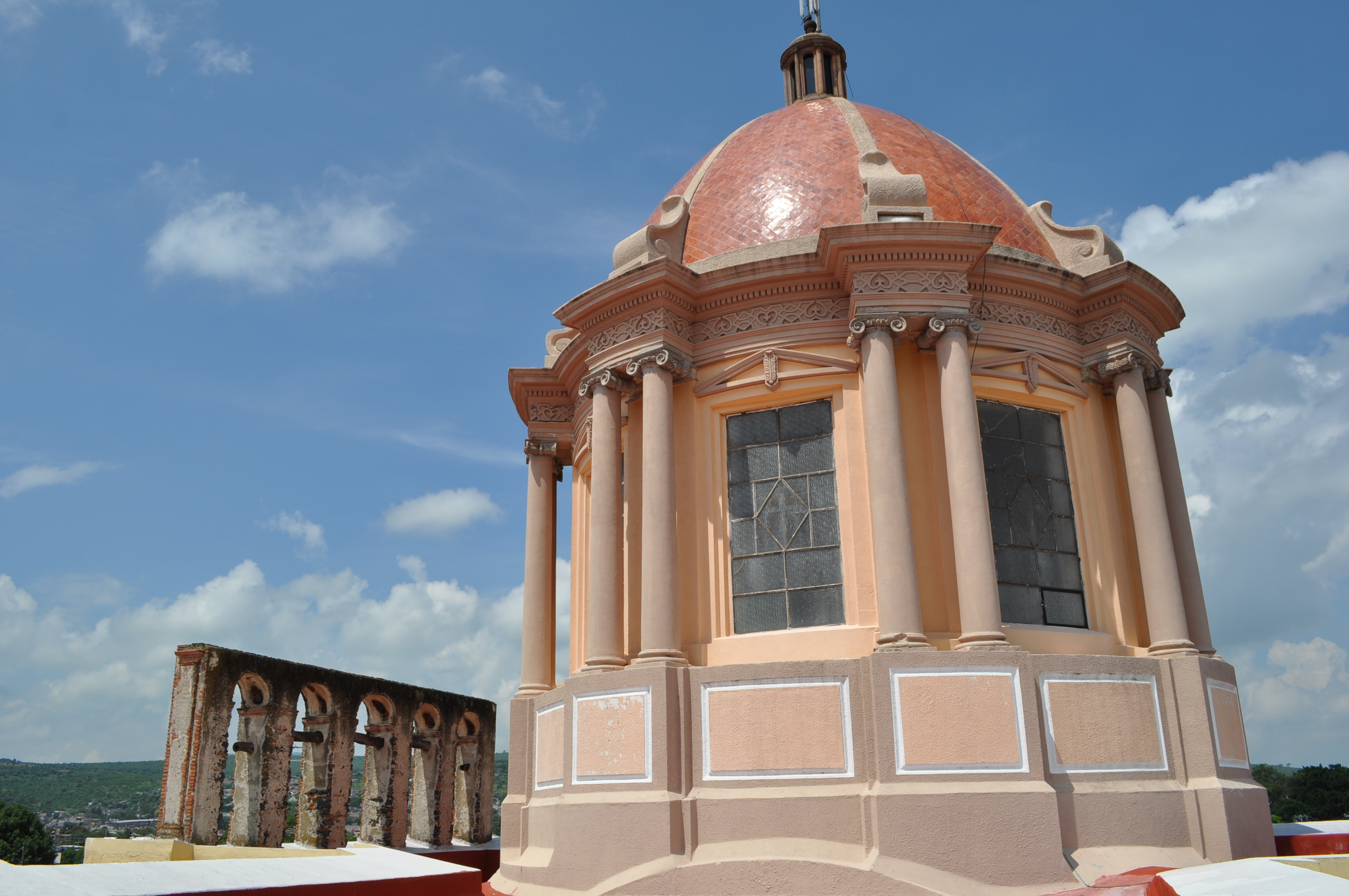 Cúpula del Templo de San Nicolás de Tolentino.